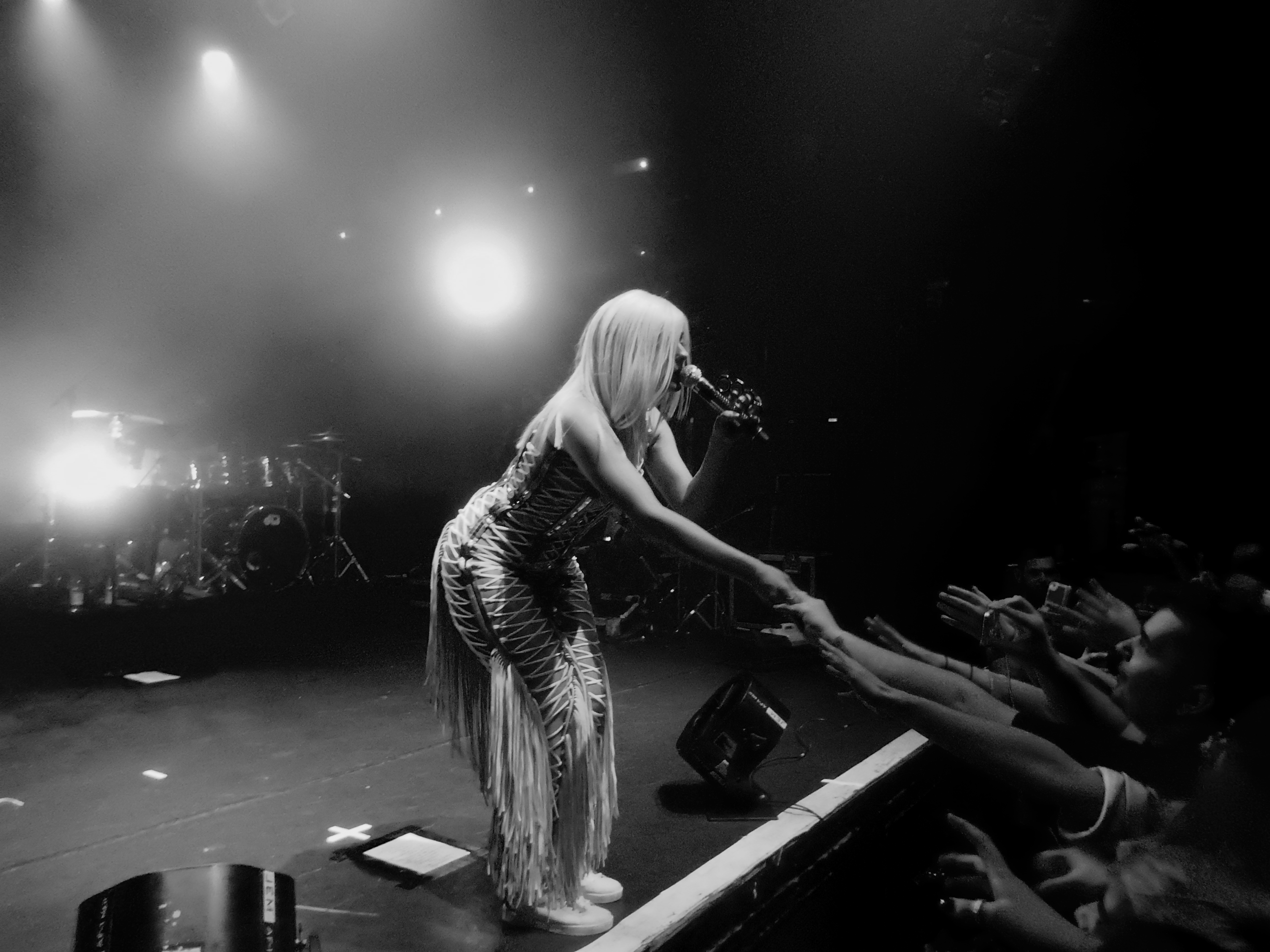 Bebe Rexha, Koko, London